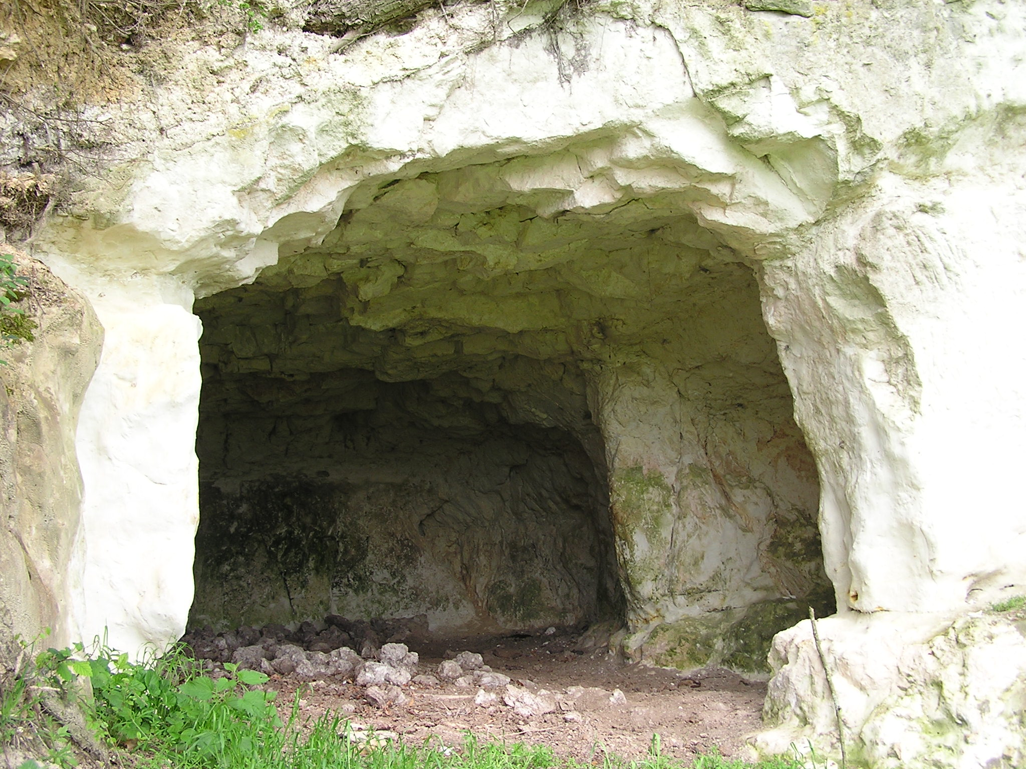 Ancienne cave sur les côteaux de la Chapelle-Huon